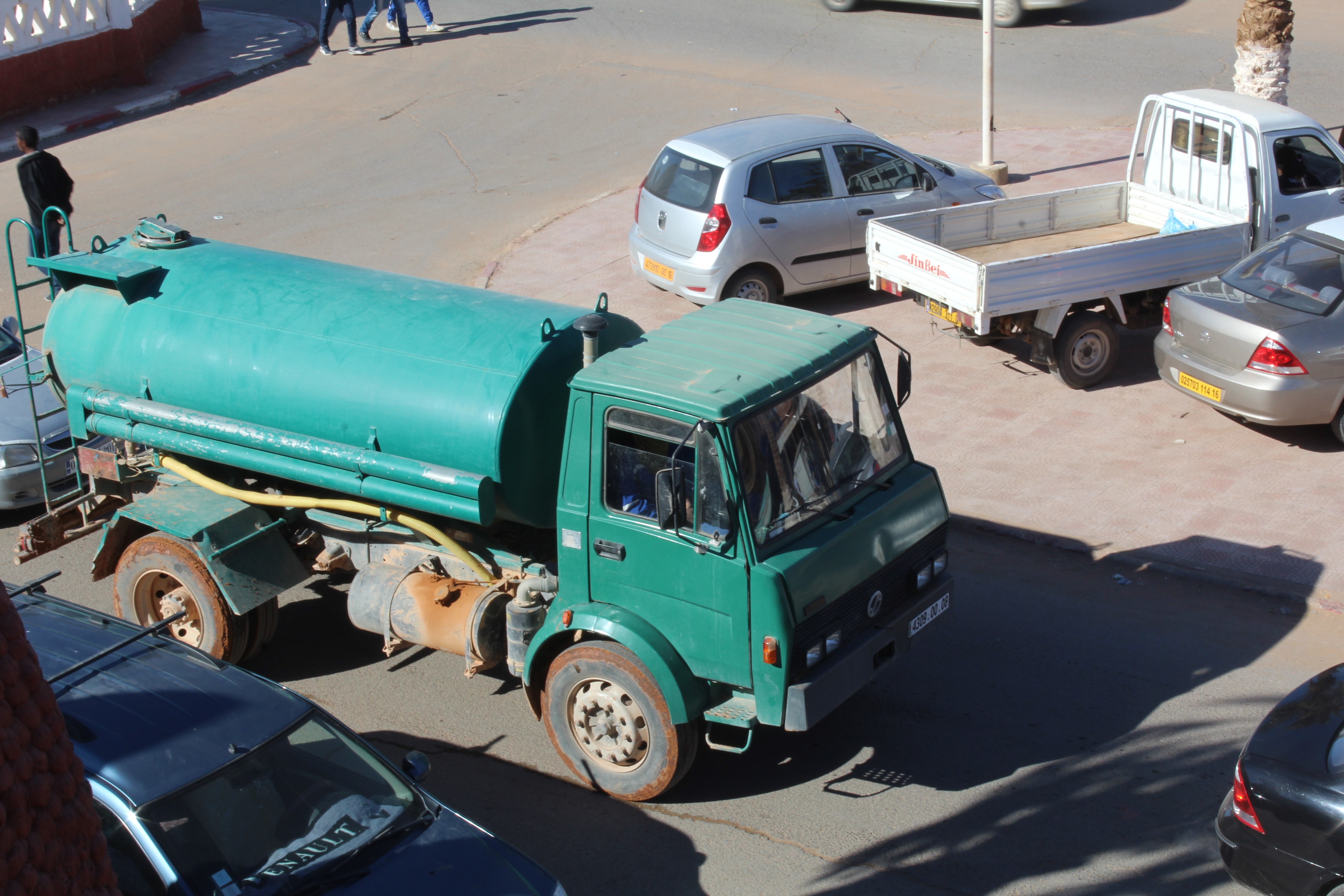 شاحنة صهريج تابعة لبلدية تيميمون من نوع ك120 علامة SNVI